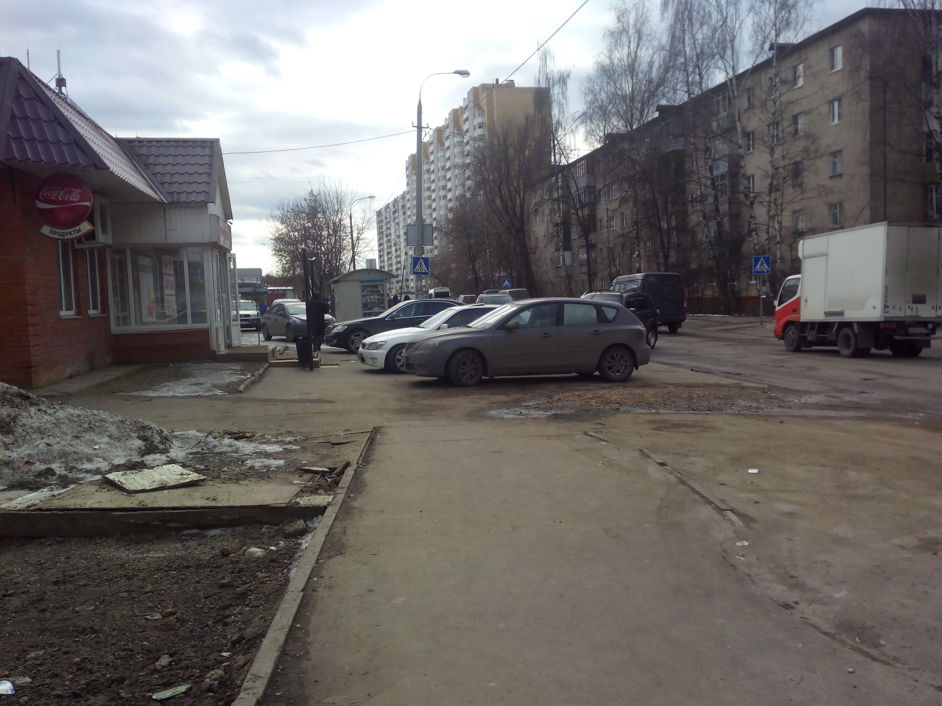 Город Королёв Московской области, район улицы Мичурина, улица Орджоникидзе, дом 5Б, улица Мичурина дом 1, дом 21А, дом 21